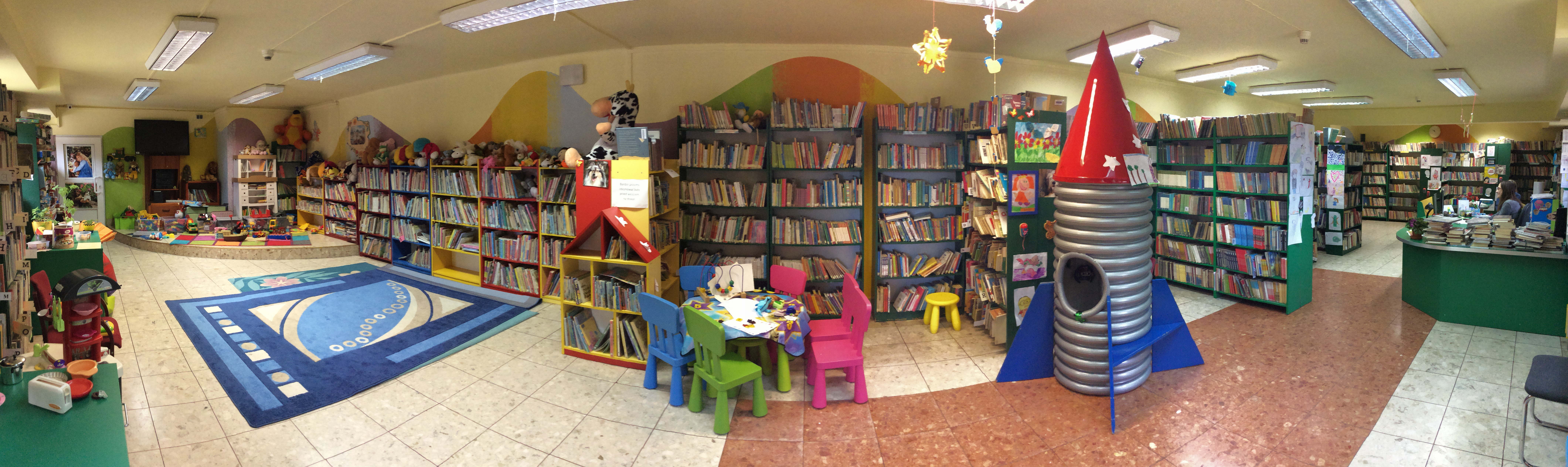 aktualizacja zdjęcia